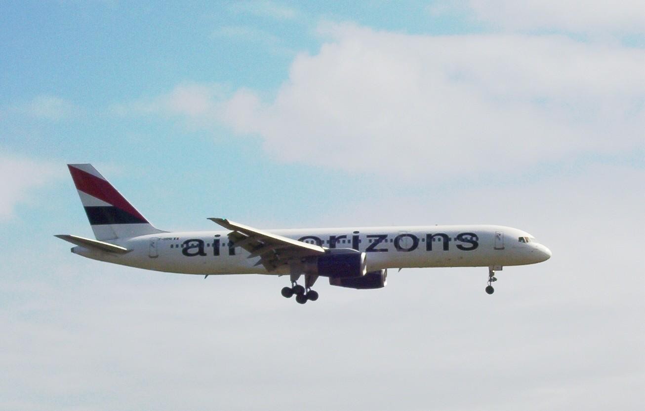 Photo d'un avion de Air horizons, prise à Gillot (RUN) Photo libre, licence perso